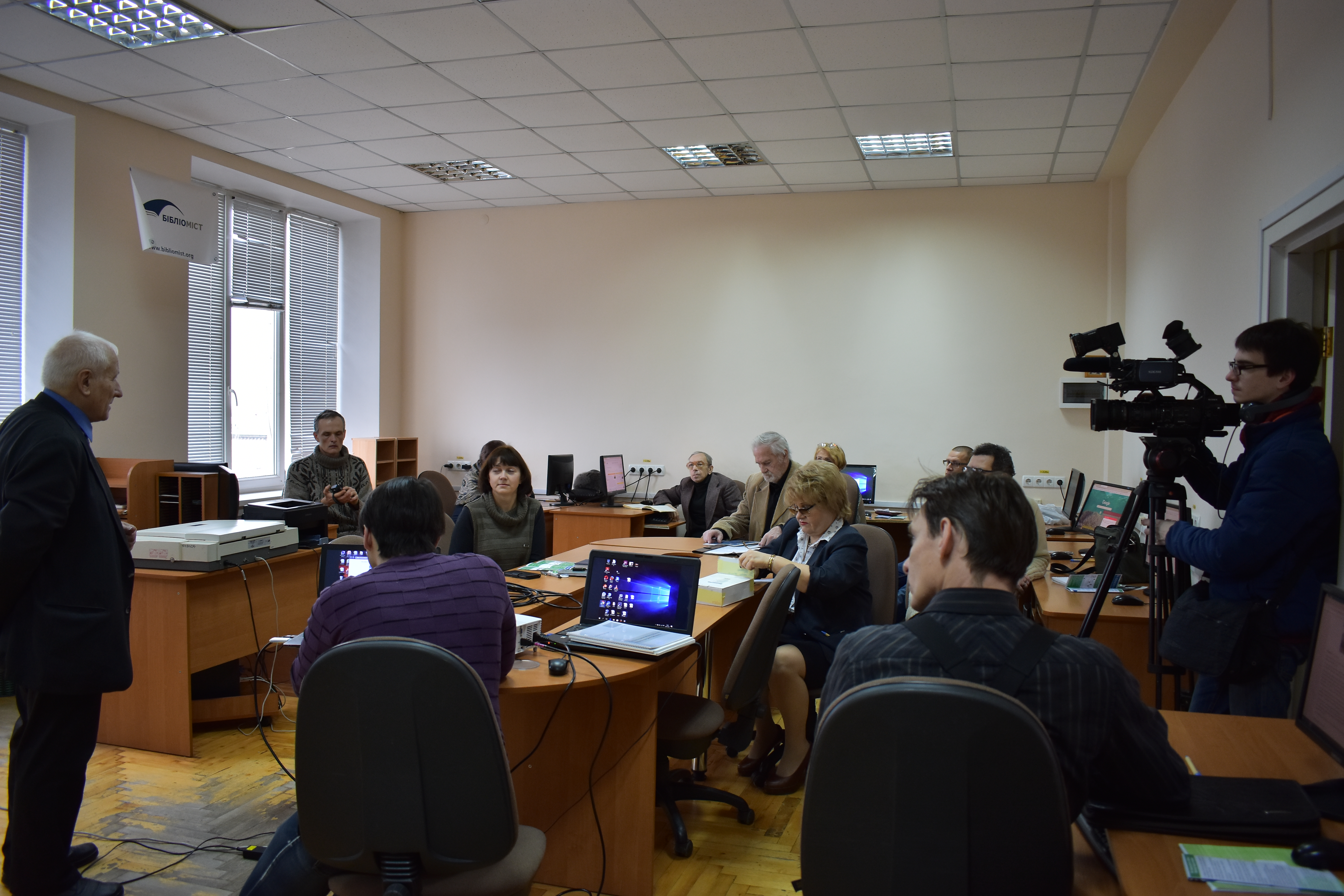 Фото